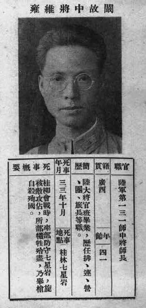 抗戰軍人忠烈錄第一輯中的烈士遺像